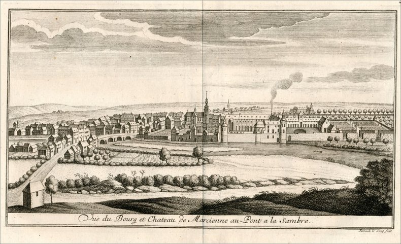 Vue du Bourg et Château de Marcienne au Pont à la Sambre - Remacle Le Loup - Les Délices du Pays de Liège (1740)